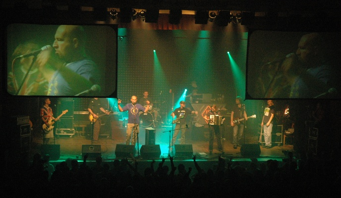 Tři Sestry v Hradci Kralové